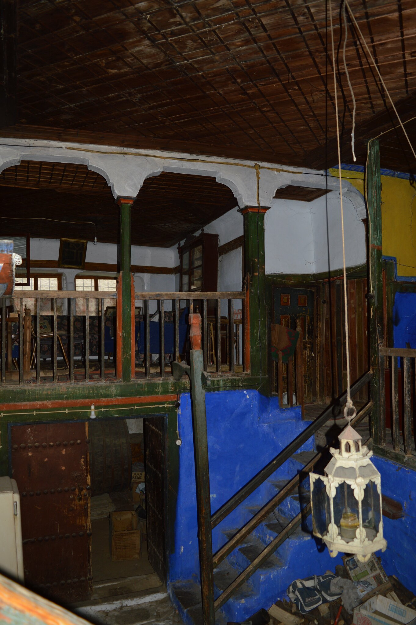 Εσωτερικό αρχοντικού στη Σιάτιστα (Αρχοντικό Κανατσούλη)